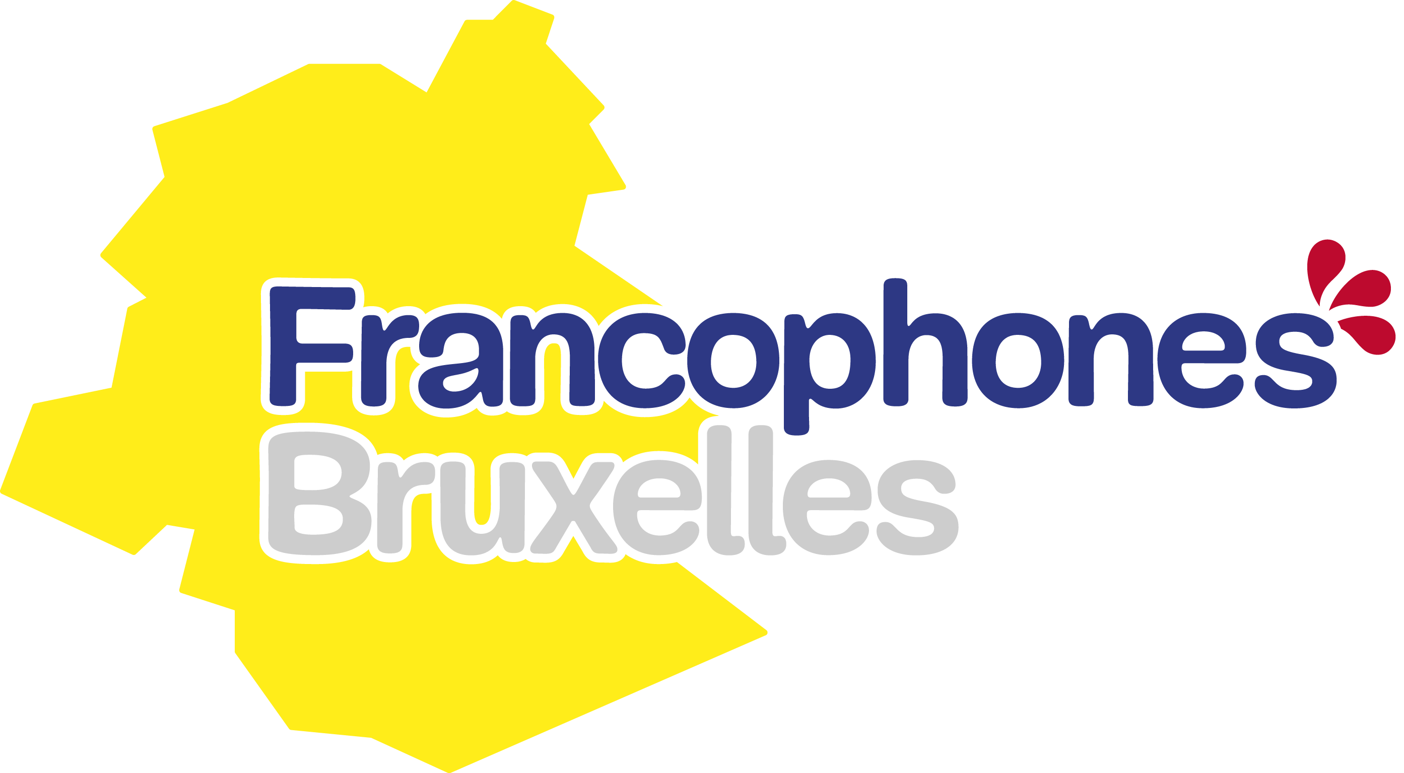 Nouveau logo du Service public francophone bruxelles (Cocof)